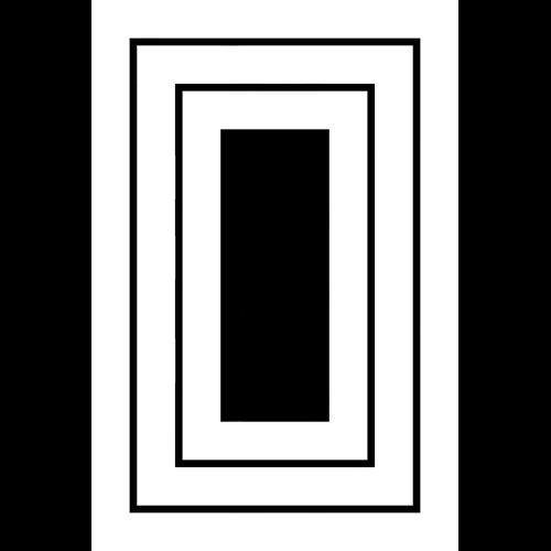 「縦長三升」紋（染抜）